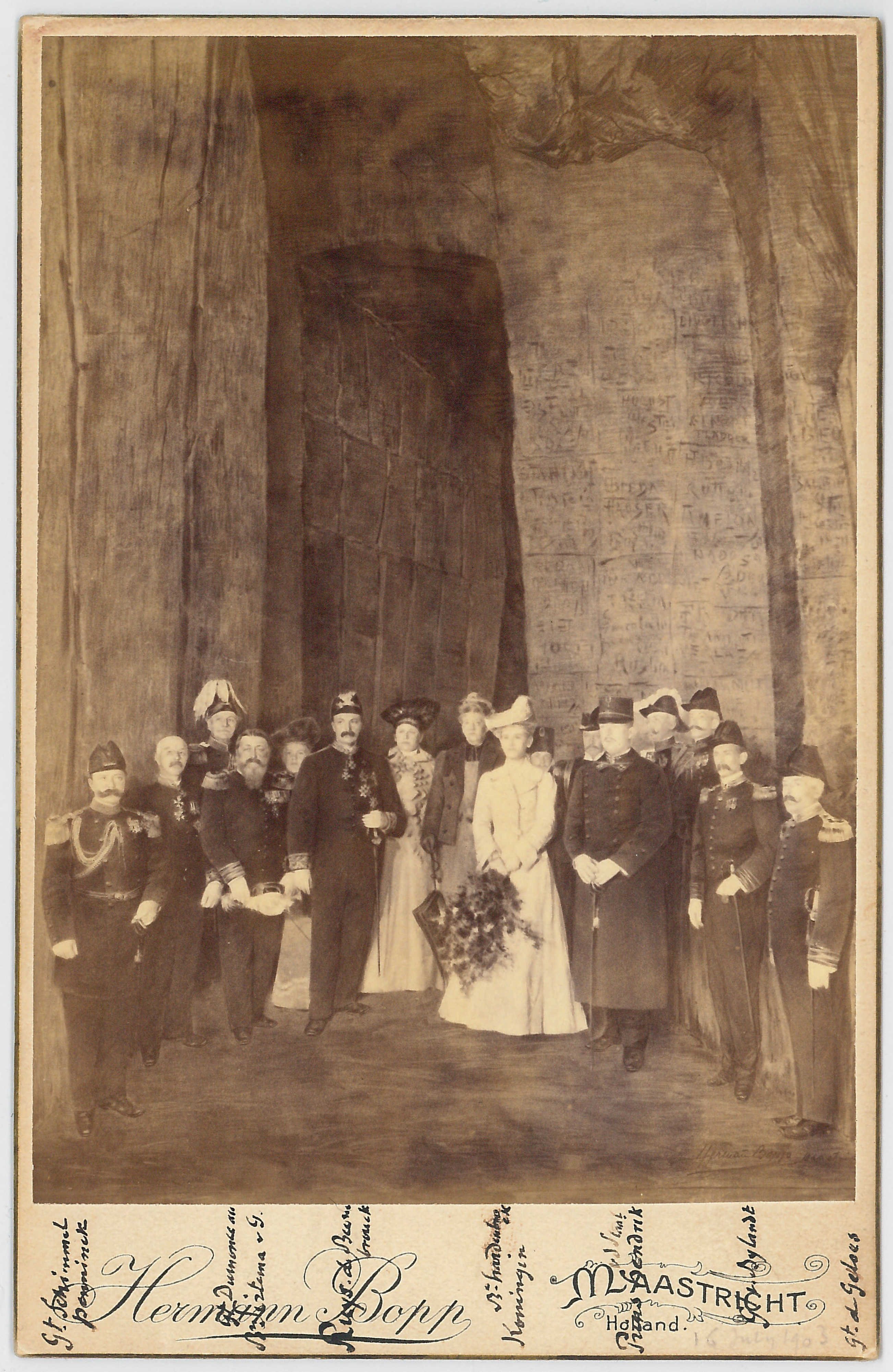 Bezoek van koningin Wilhelima aan Sint-Pietersberg bij Negendrup (Slavante), Sint-Pietersberg, Maastricht, Nederland